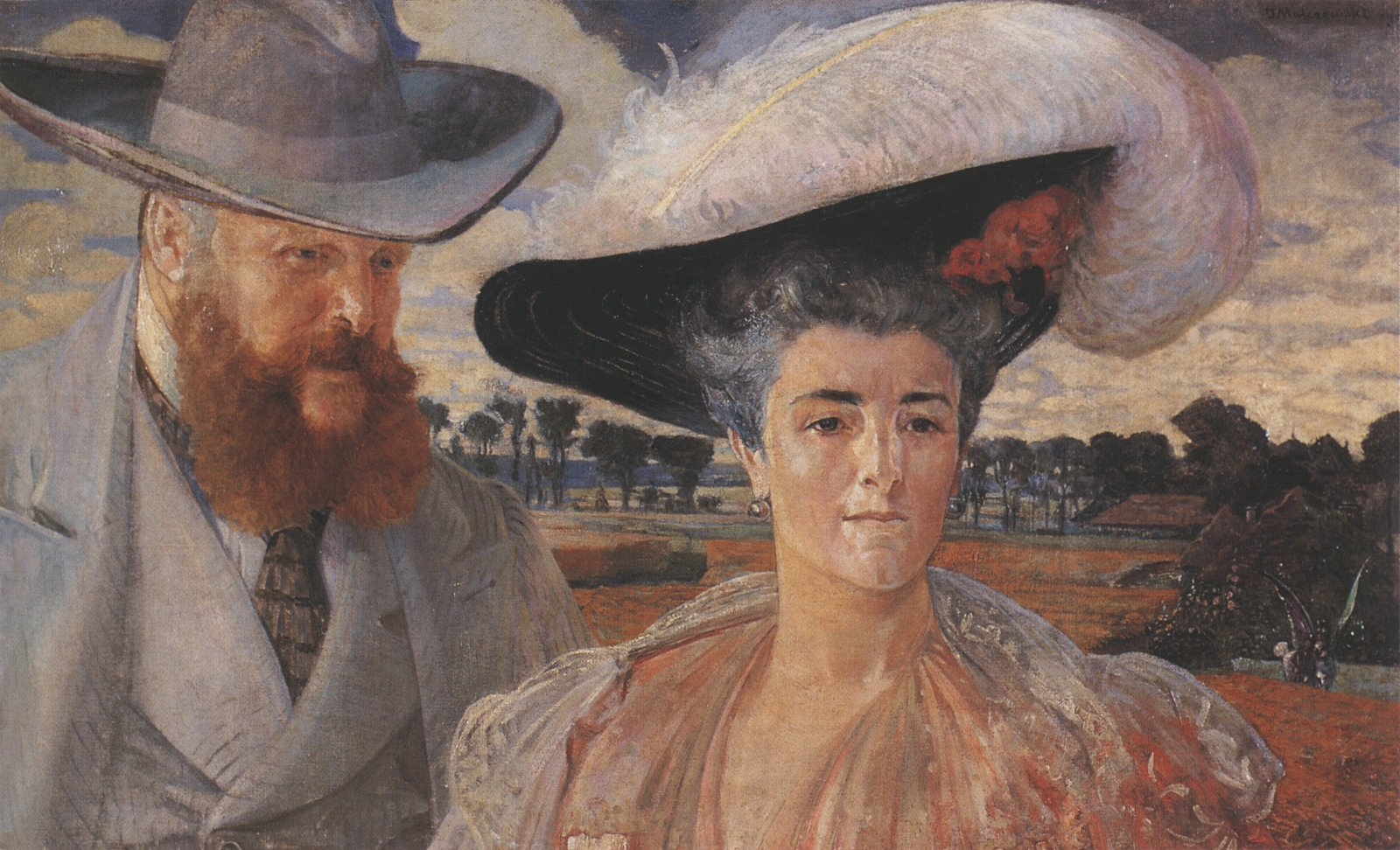 Portret Karola i Małgorzaty Lanckorońskich